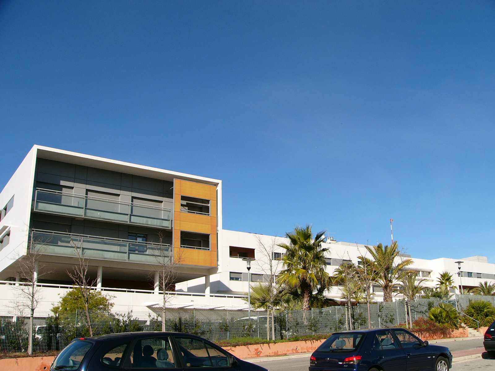 Vue du pôle de santé du golfe de Saint-Tropez depuis le parking